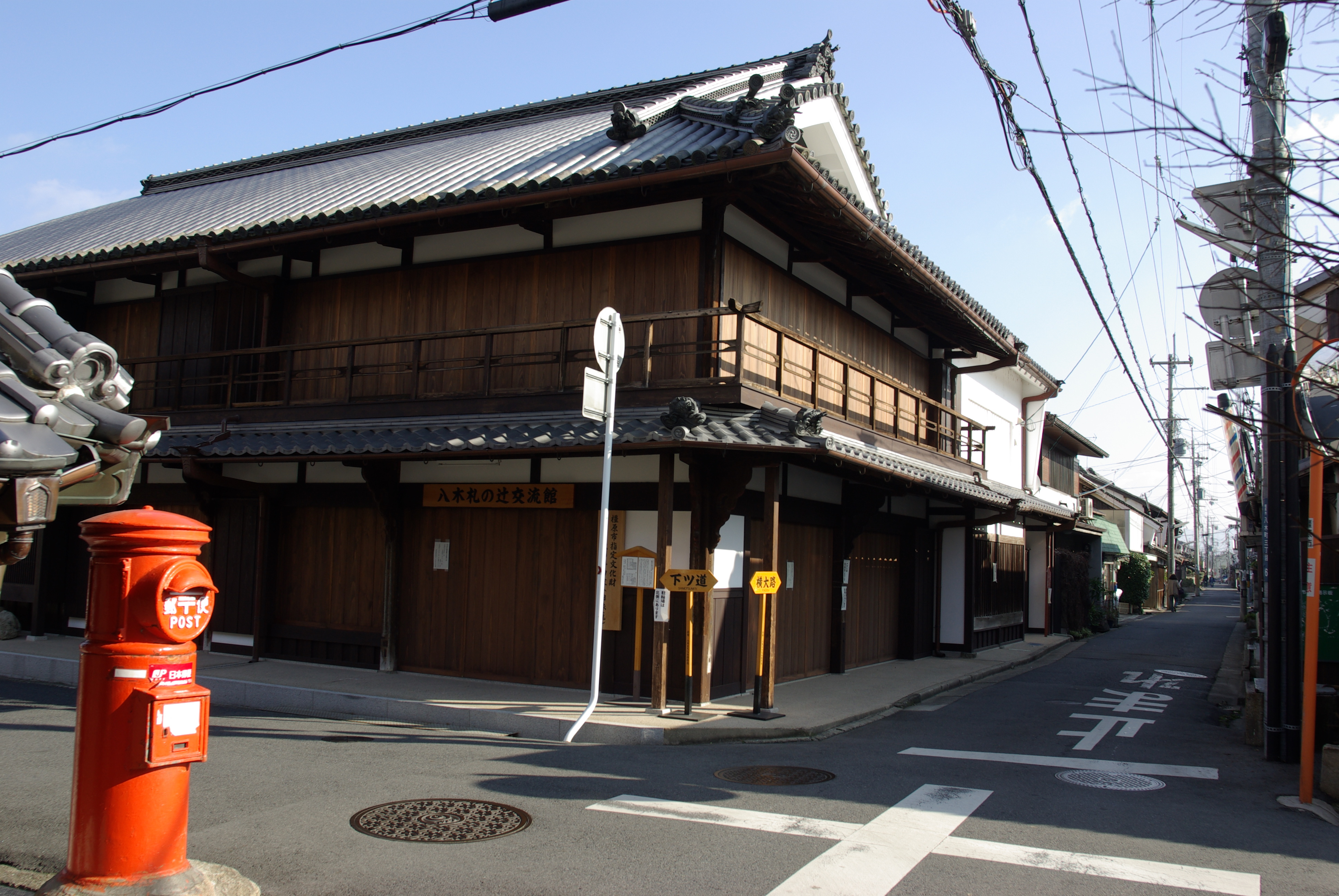 下ツ道と横大路の交差点、八木札の辻。八木札の辻交流館（旧東の平田家）